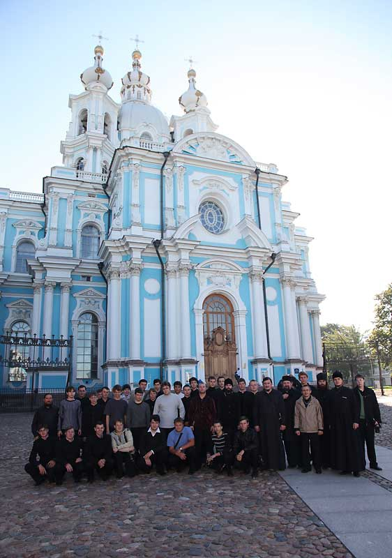 Паломничество студентов СПДС в Санкт-Петербург